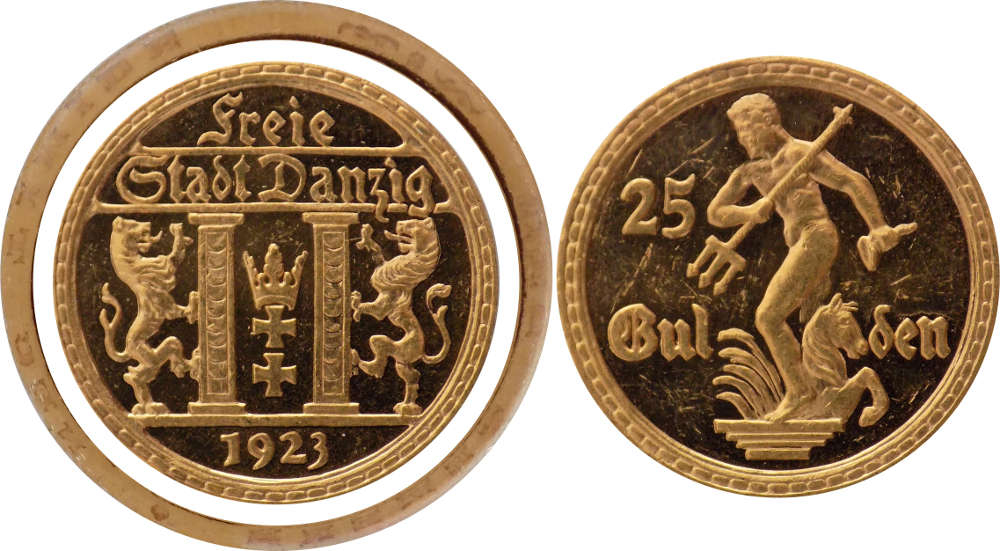 25 guldenów 1923